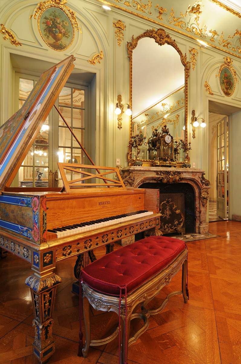 Palacio de don Félix Ortiz de Taranco. Ubicada en el departamento de Montevideo